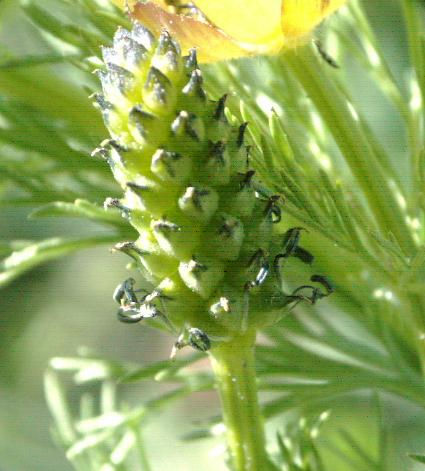 Fotografía realizada por Pablo Alberto Salguero Quiles en el mes de abril en Aranjuez Madrid España. La fotografía no es muy buena pero muestra diferencias definitorias entre las adonis.